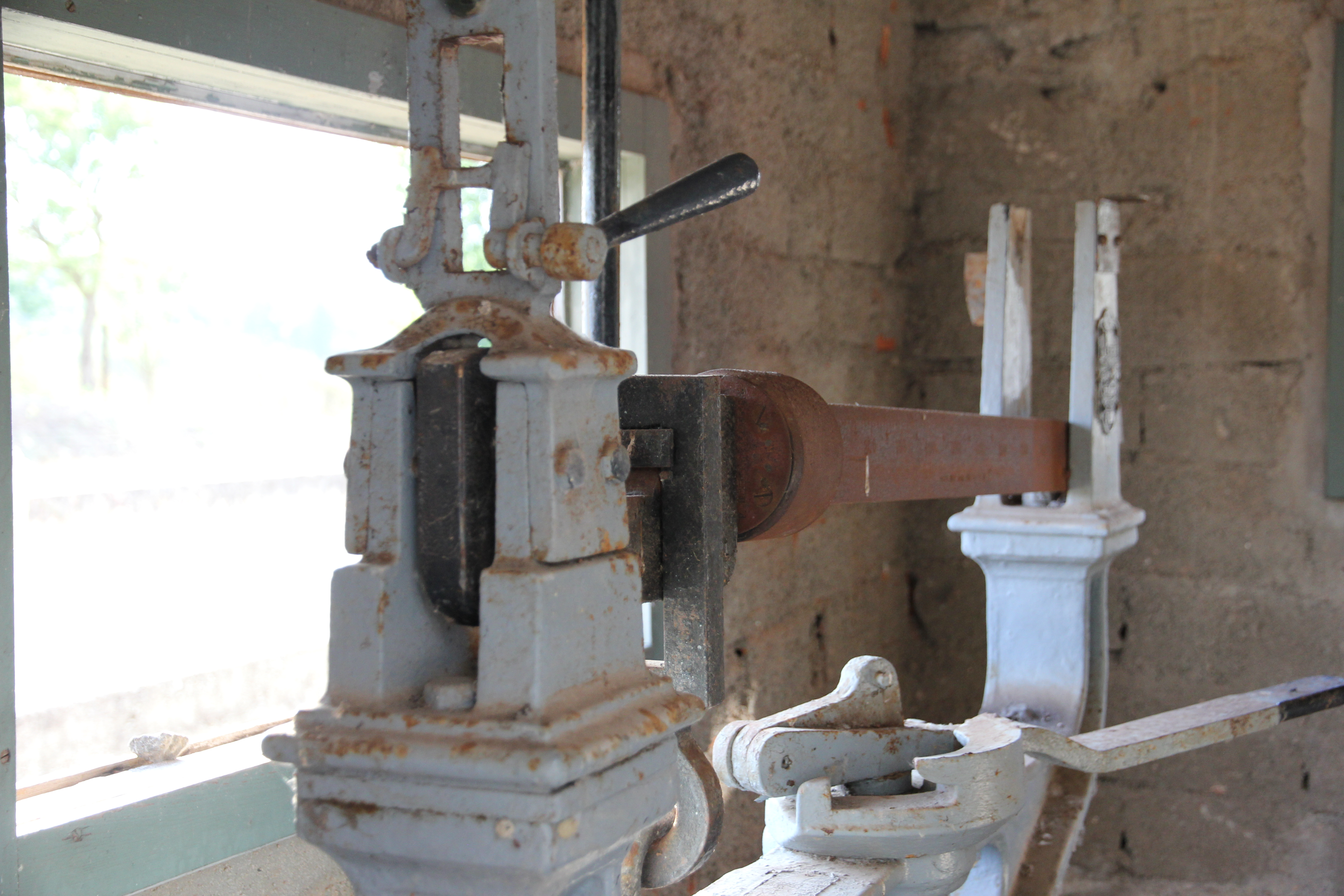 Perfugas - Stazione ferroviaria